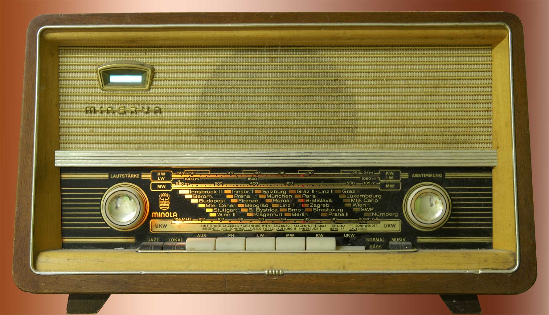 Minerva Minola, BJ 1962 Röhrenradio "Minerva Minola", Superhetempfänger aus 1962.